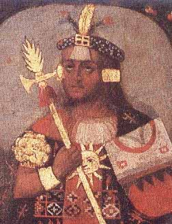 Retrato de Pachacútec, detalle de una pintura de los Sapa Incas.